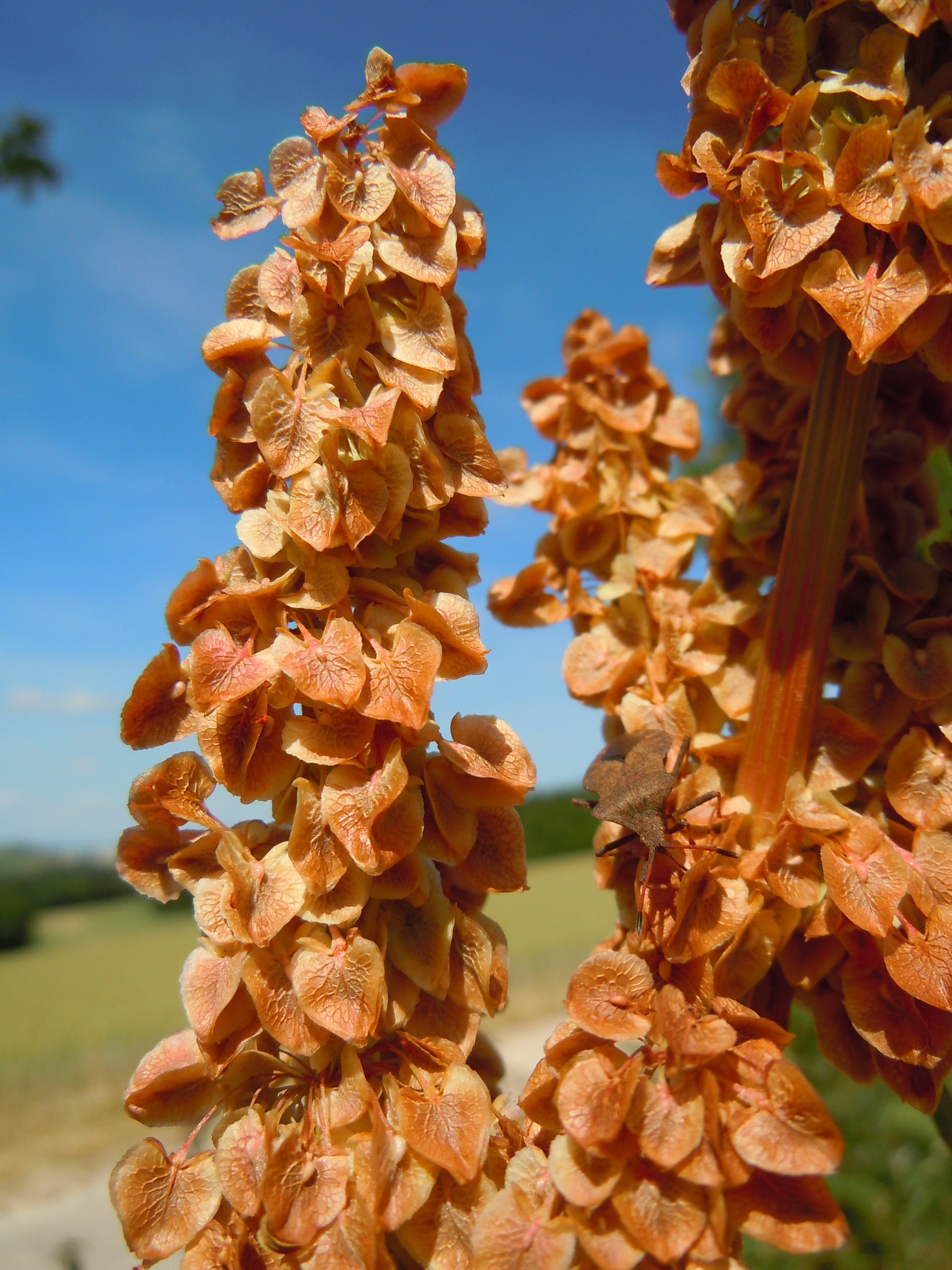 Rumex longifolius, le long d'un chemin sur les hauts du Parc de la Combe à la Serpent, (Côte-d'Or) en juin. Noter la présence de Syromastes rhombeus.